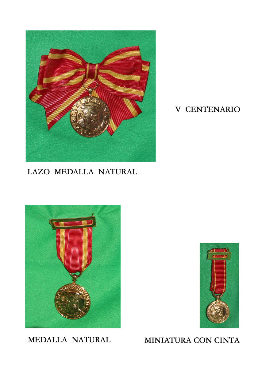 Medalla conmemorativa